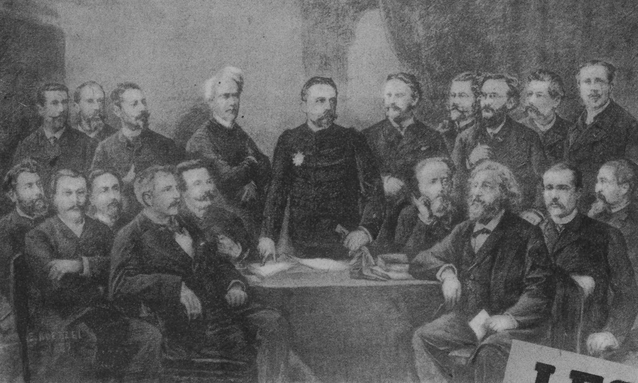 "Le général Boulanger au milieu de ses principaux partisans. Debout, de gauche à droite : Thiébaud, député ; Lalou, directeur de La France ; Susini, député ; Henri Rochefort ; Boulanger ; Laporte, député ; Chevrillon [sic], député ; Laisant, député ; Borie, député ; Paul Déroulède, président de la Ligue des Patriotes. Assis de gauche à droite : Michelin, député ; Vergoin, député ; Vacher, député ; Saint-Martin, député ; Le Hérissé, député : Turquet, député ; Naquet, sénateur ; Georges Laguerre, député, et Francis Laur, député".